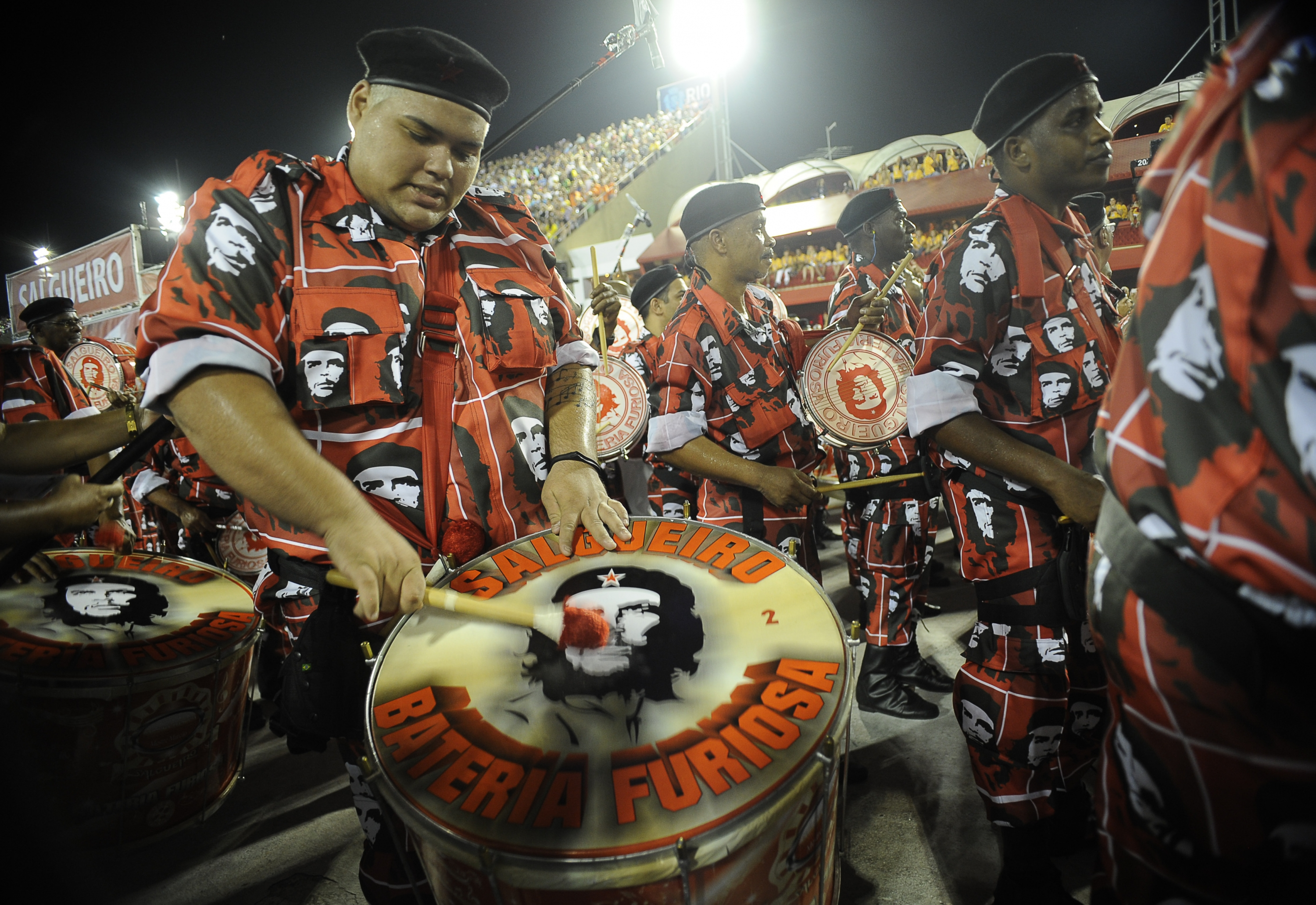 Rio de Janeiro - Unidos do Salgueiro foi a segunda escola a desfilar no primeiro dia de apresentações do Grupo Especial no Rio (Tânia Rêgo/ABr)